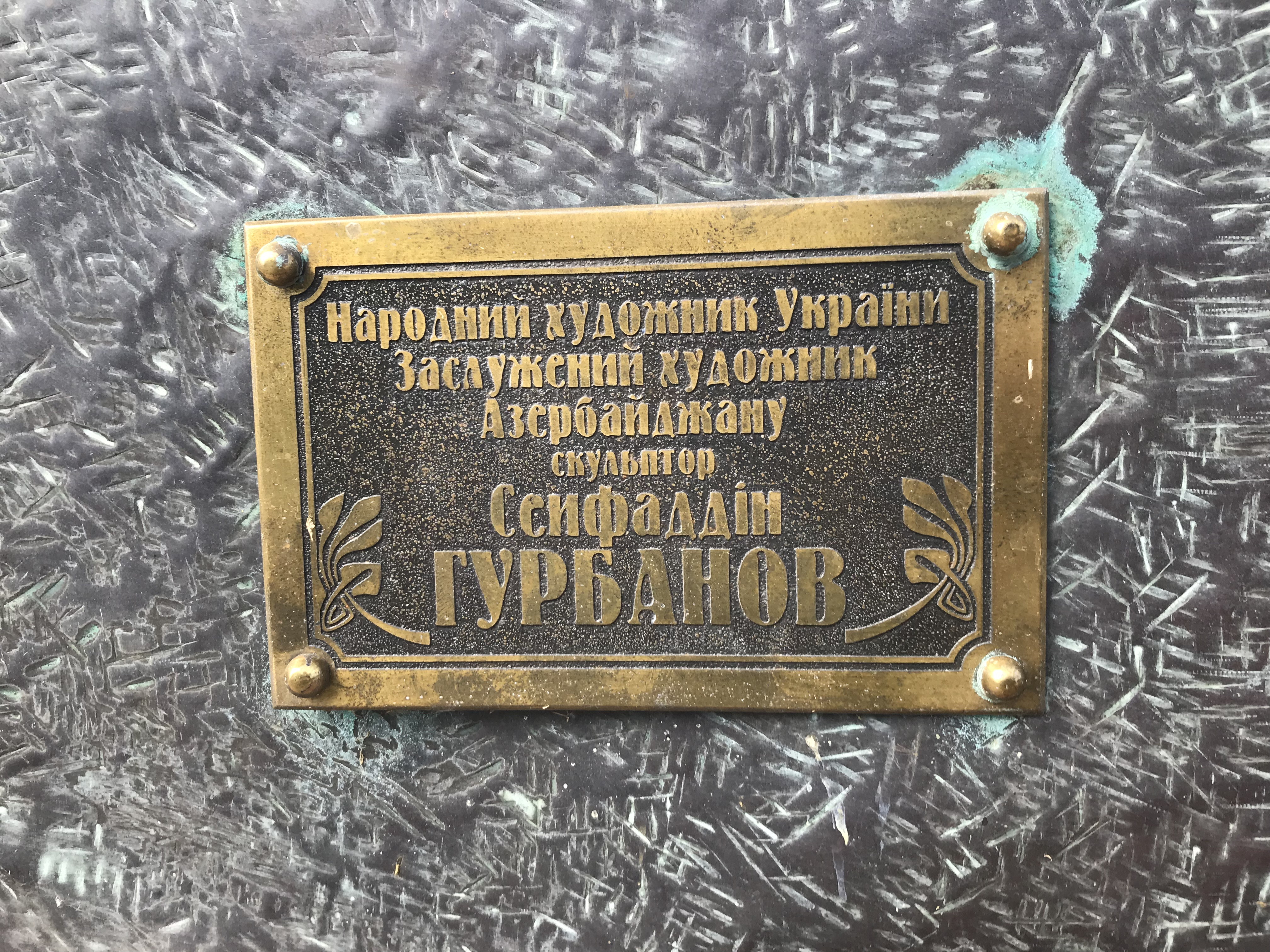 Табличка на памятнике Муслима Магомаева, Киев. Сквер Муслима Магомаева в Киеве